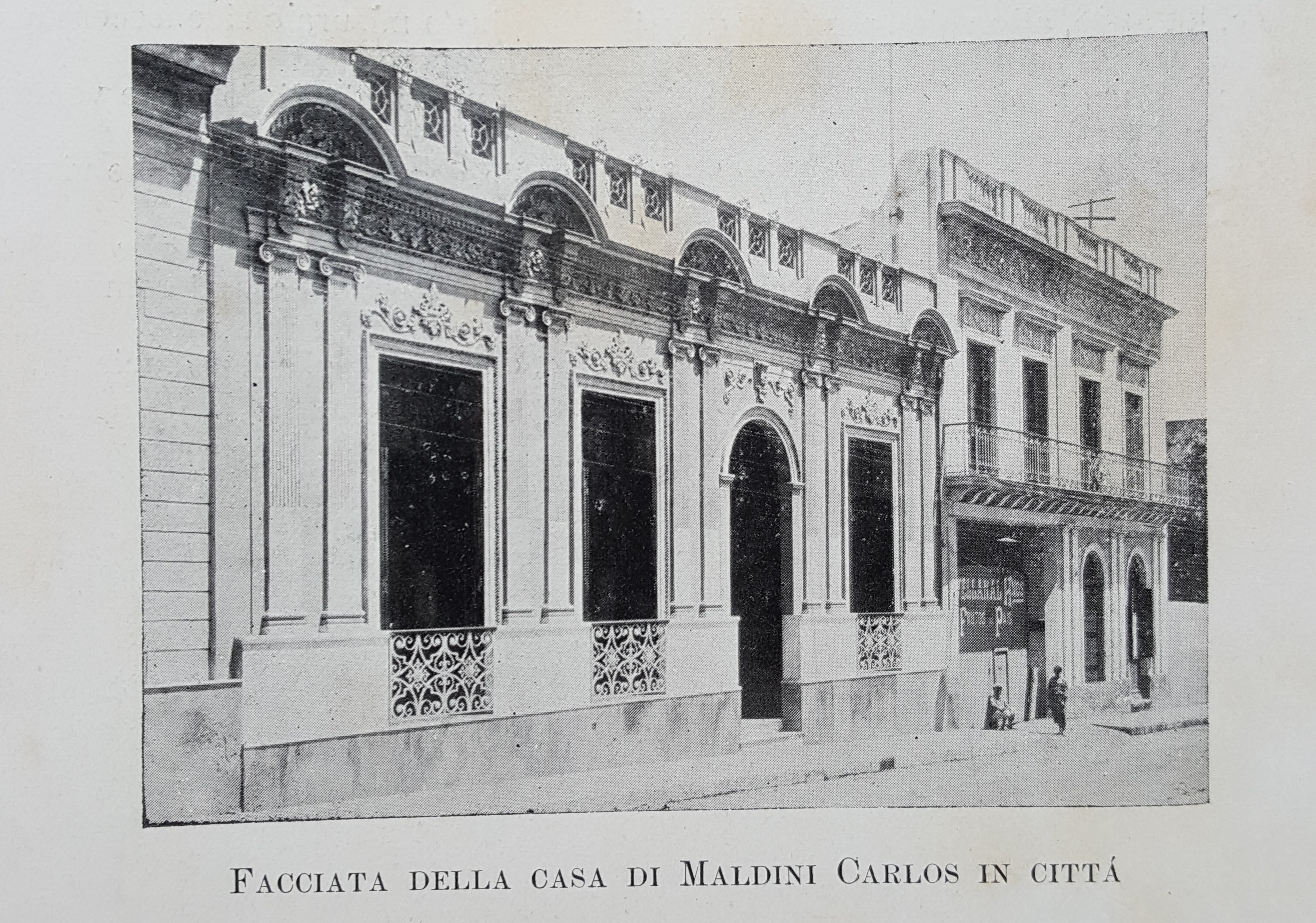 dal libro AA.VV., "Gli italiani di Salto Rep. O. dell'Uruguay all'Esposizione di Milano", Salto, Uruguay, 1906.